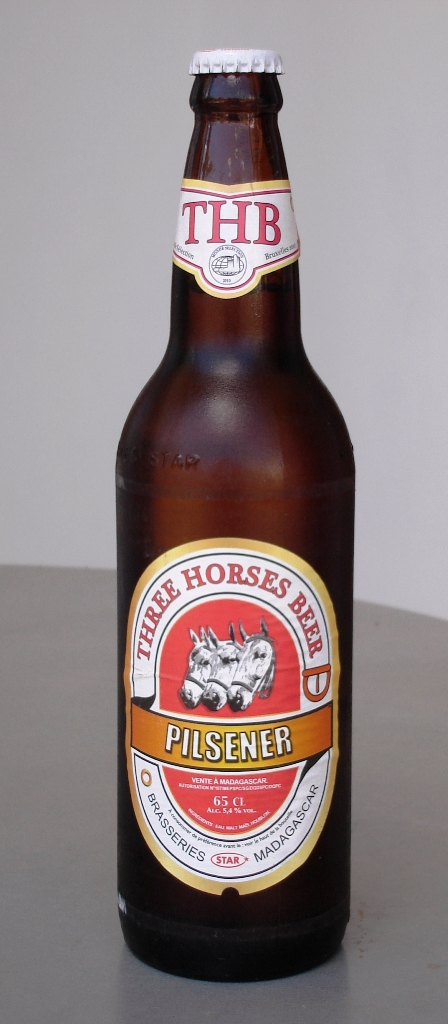 Three Horses Beer, eine 0,65l Flasche der Sorte „Pilsener“